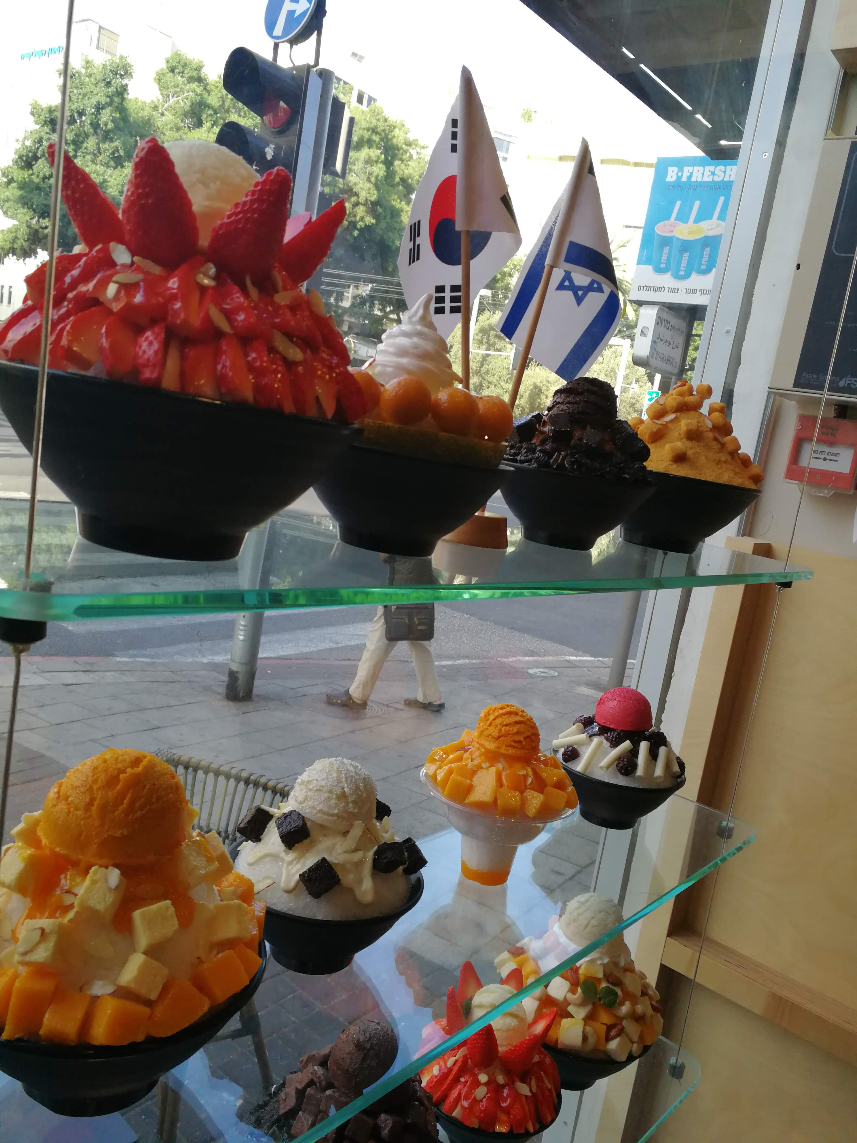 מודלים מפלסטיק בחנות למכירת בינג סו